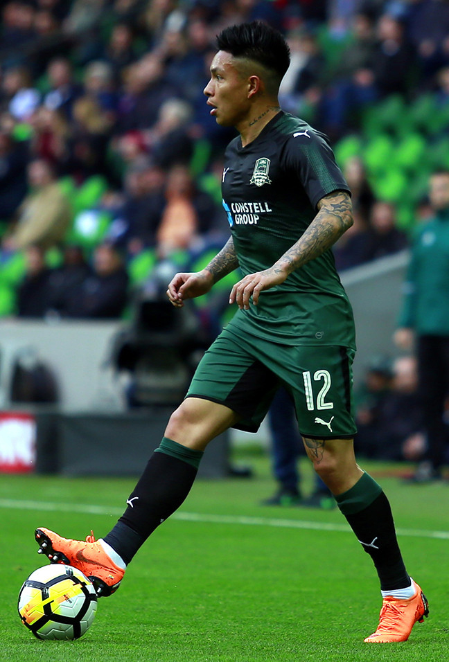 «Уфа» сотворила сенсацию в Краснодаре